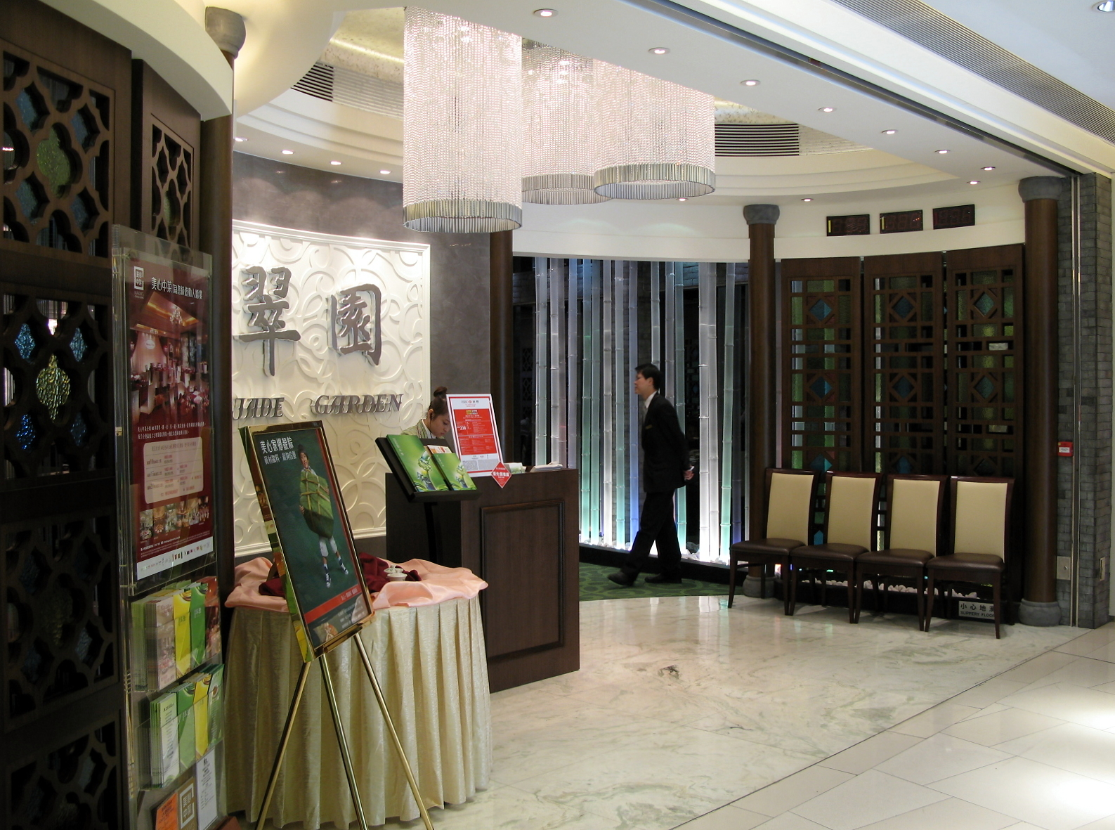 Jade Garden in Citywalk